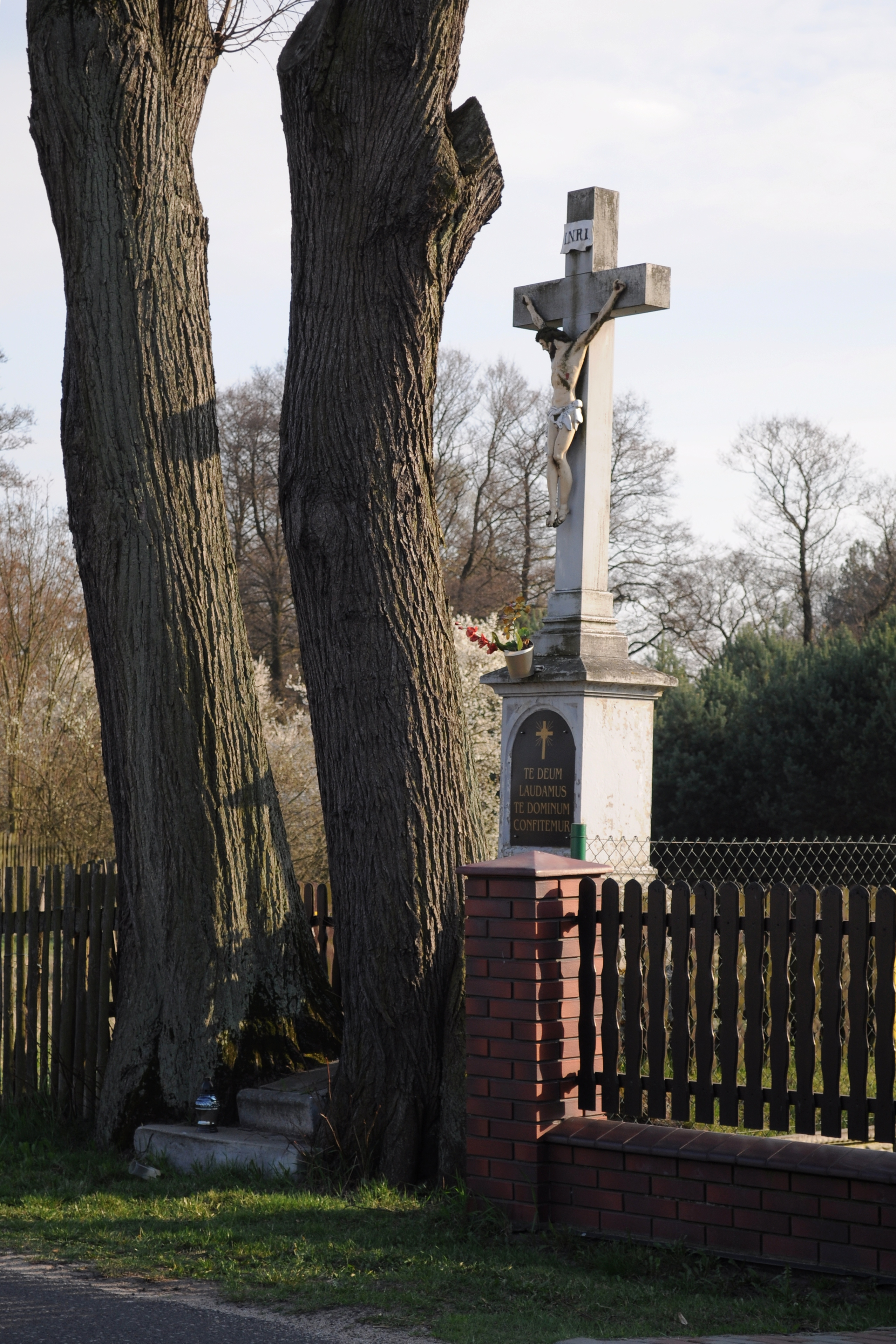 Hanusek. Krzyż przydrożny.